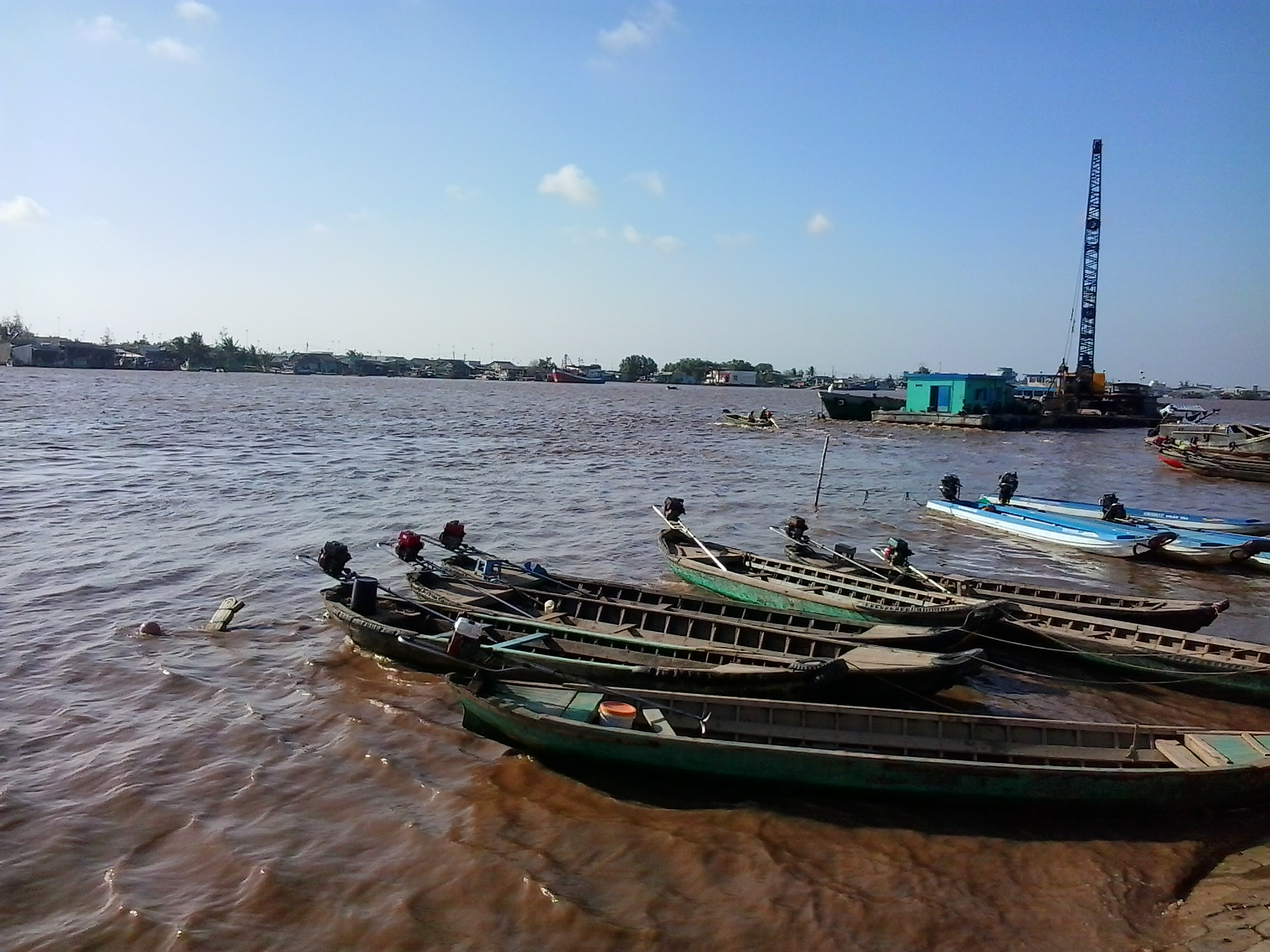 Gành Hào River